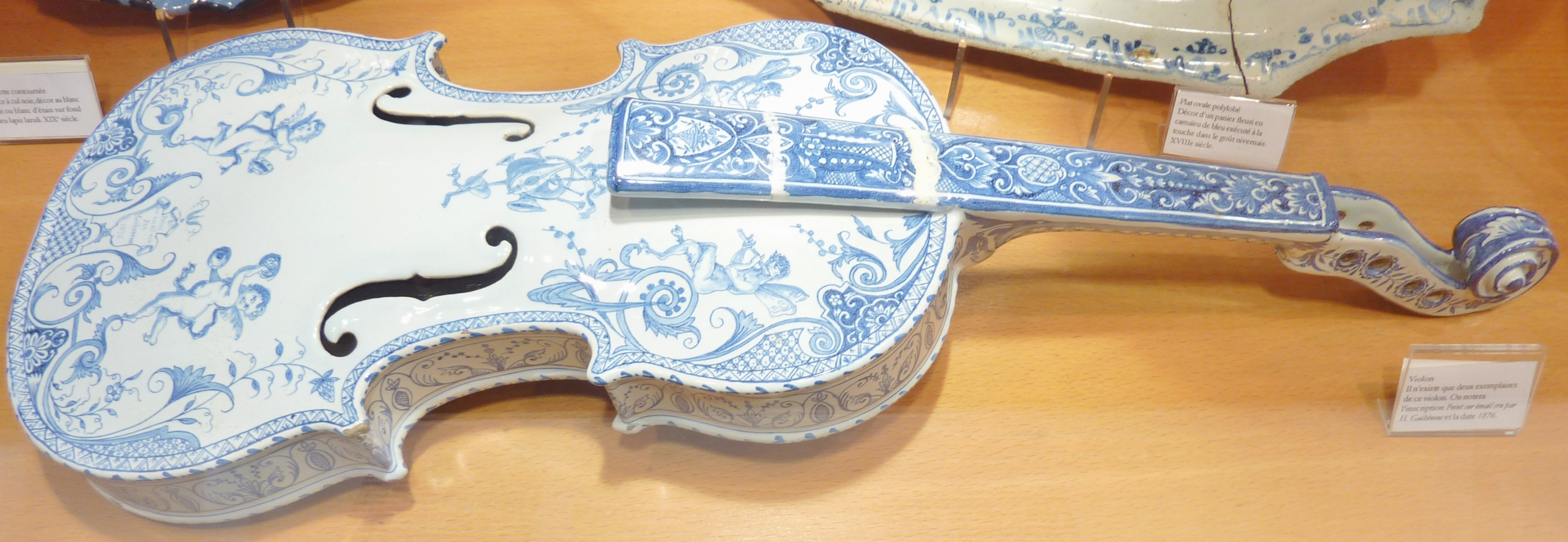 Faïence de Quimper : violon peint sur émail cru (par H. Guibénat, 1876, Musée de la faïence de Quimper)